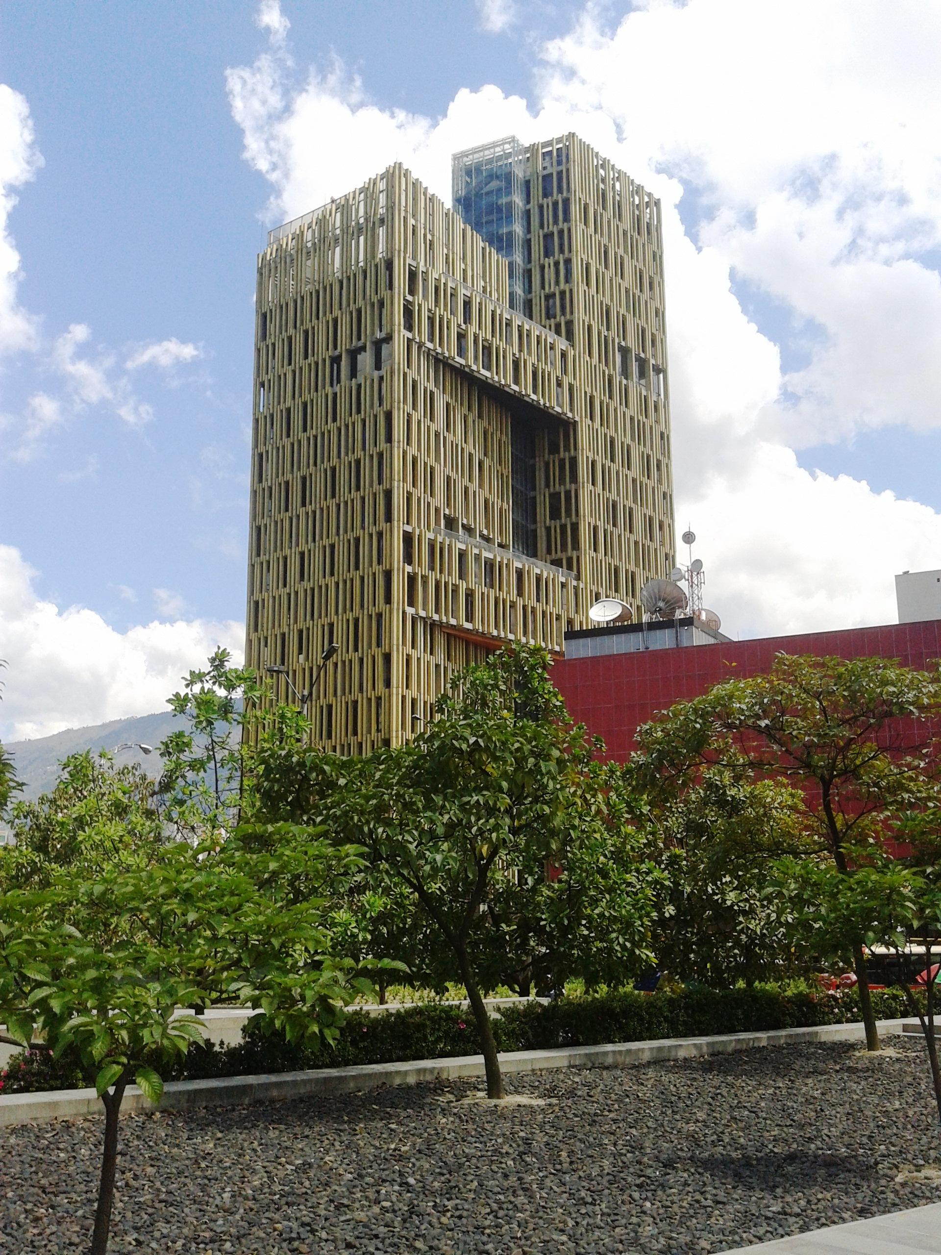 Torres de la plaza de la Libertad, Medellín